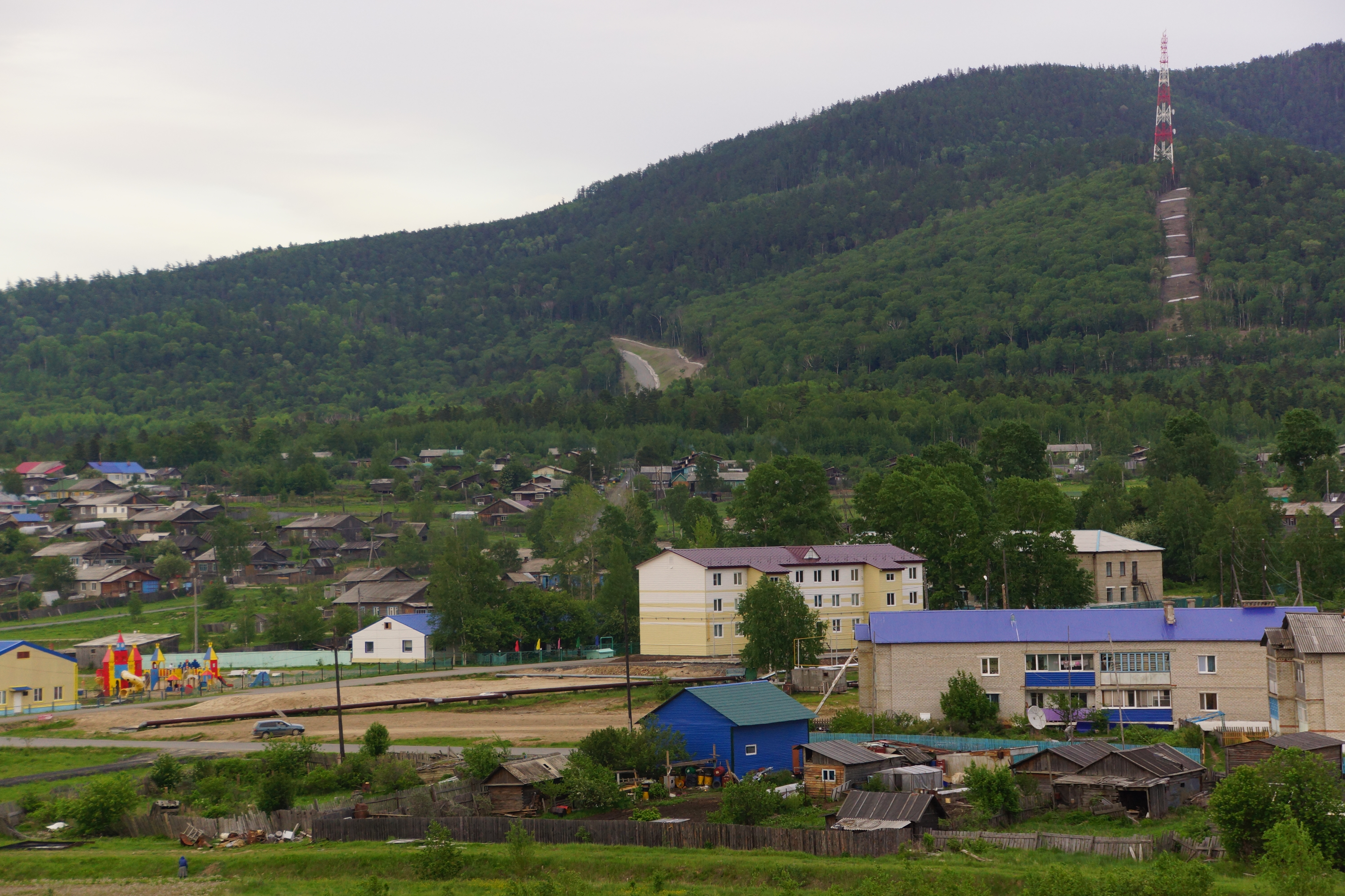 Ретранслятор, обеспечивающий поселок мобильной связью основных операторов.